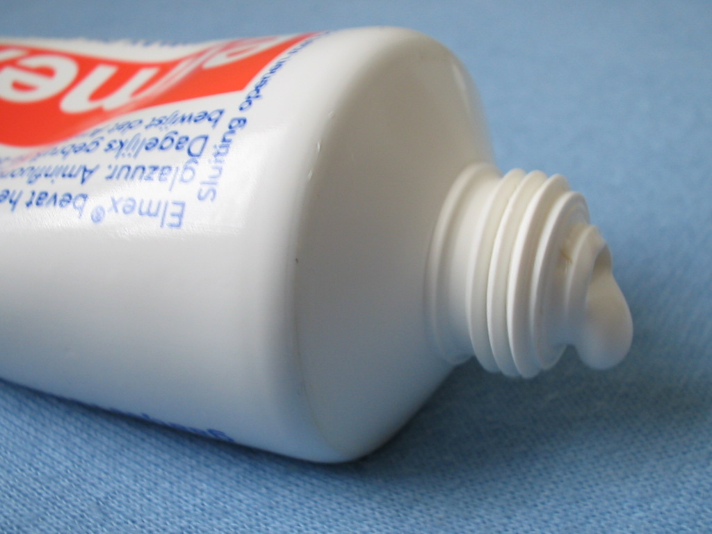 tandpasta uit een tube